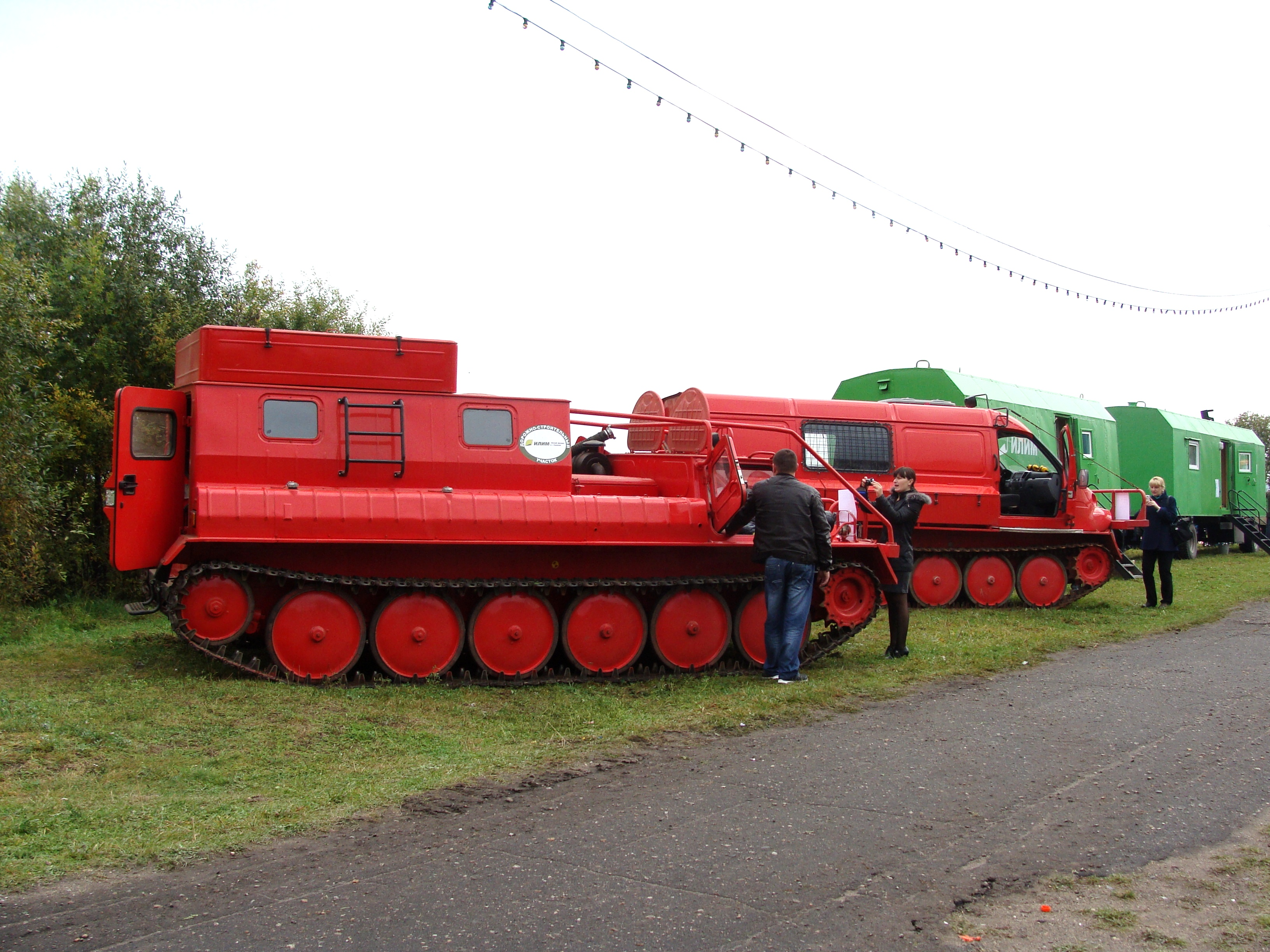 Снегоболотоходы лесопожарные гусеничные ГАЗ-34039 (слева) и ГАЗ-34039 Ирбис